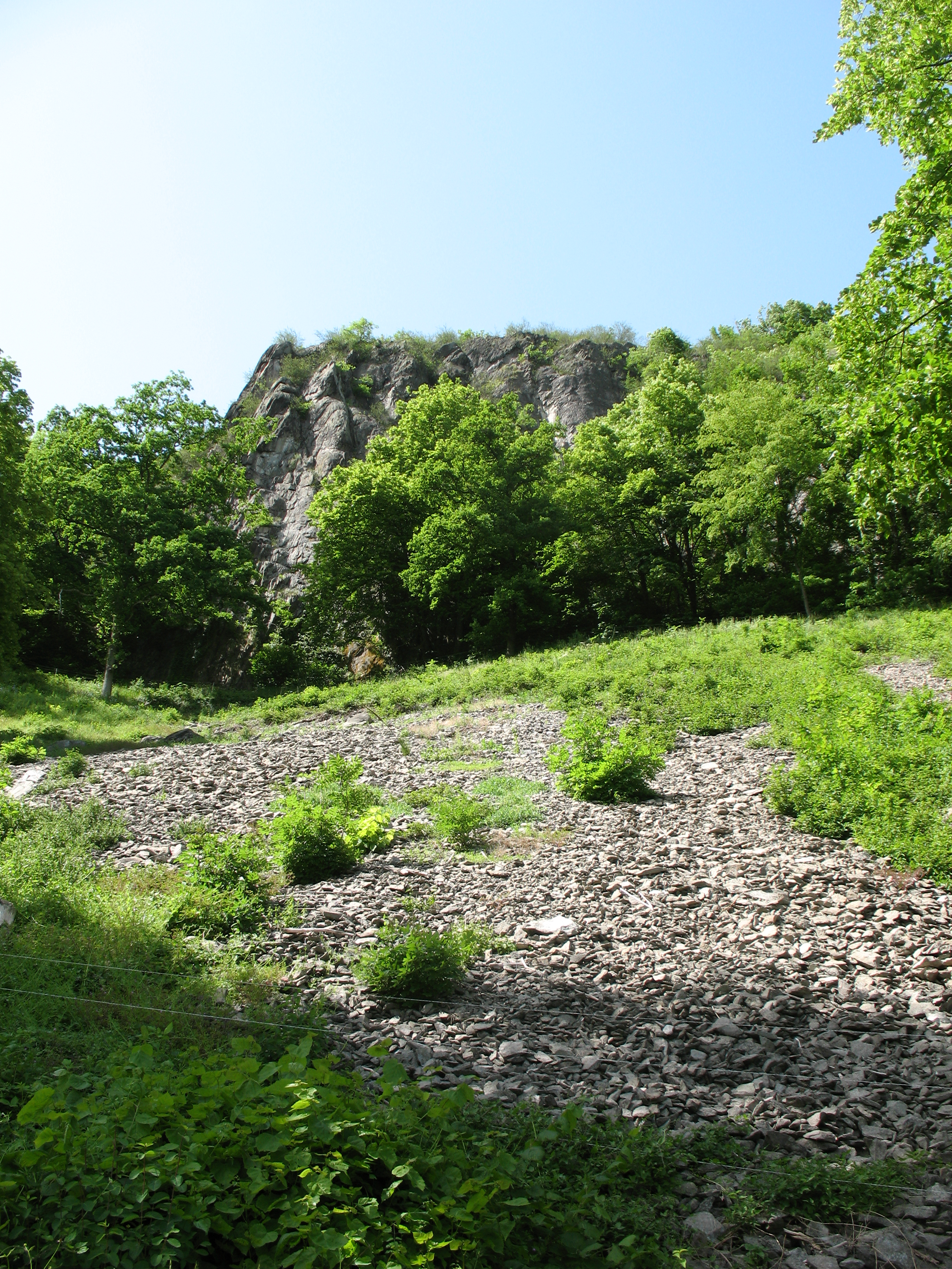 Phonolith-Fels (oben) und Phonolith-Schutt (unten) am Osthang des Hohentwiel